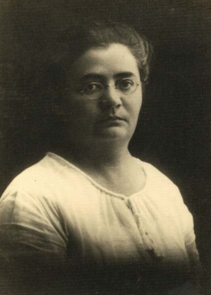 ד"ר בת שבע יוניס גוטמן- מהרופאות הראשונות בארץ ישראל.